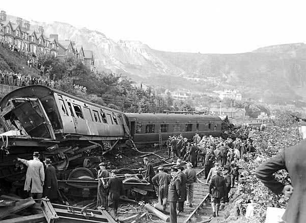 Teitl Cymraeg/Welsh title: Canlyniadau damwain trên Penmaenmawr (Medi 1950) Cyfrwng/Medium: Negydd ffilm / Film negative Cyfeiriad/Reference: (gch01469) Rhif cofnod / Record no.: 3367904 Rhagor o wybodaeth am gasgliad Geoff Charles yn Llyfrgell Genedlaethol Cymru More information about the Geoff Charles Collection at the National Library of Wales Mae ffotograffau Geoff Charles hefyd yn rhan o Broject Europeana Libraries Geoff Charles' photographs also form part of the Europeana Libraries Project